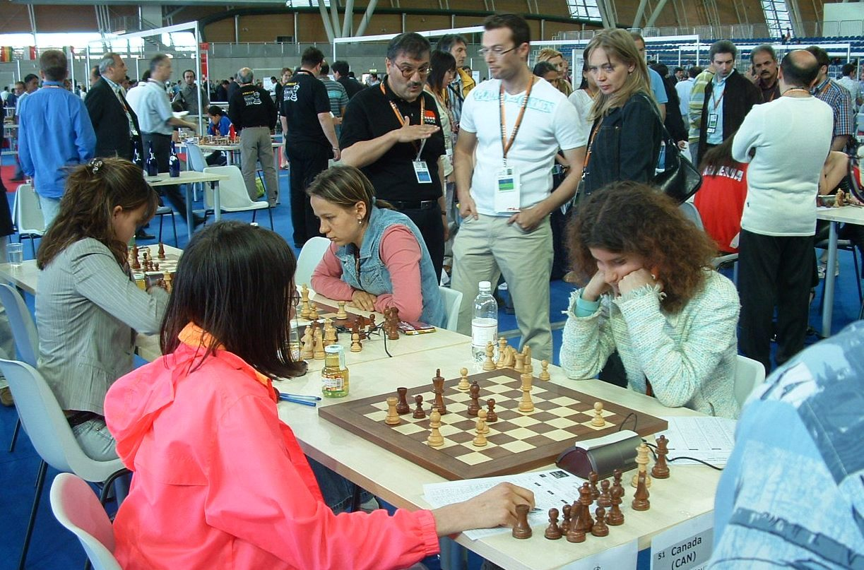 foto del match Canada-Italia A alle olimpiadi di scacchi di Torino 2006